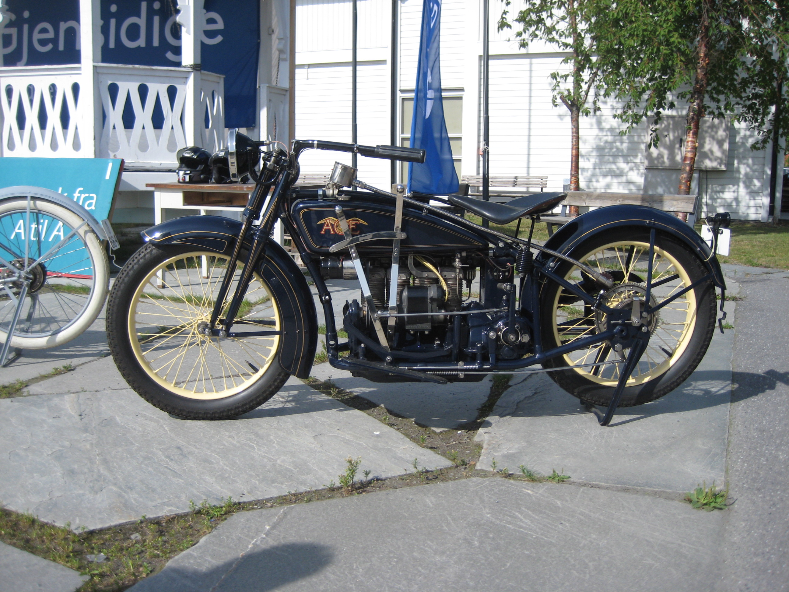 Ace 1280, 1923. Indian Summer Meet 2014. Fagernes, Norway